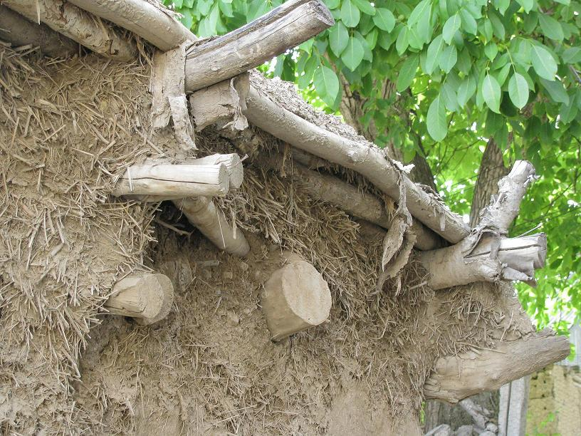 نماي معماری دهه ۵0 به قبل در روستای باریکان